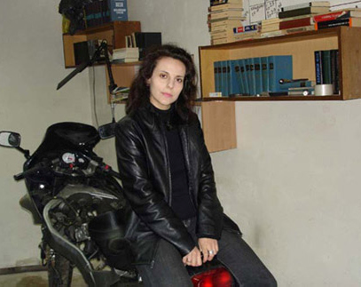 Elena Filatova